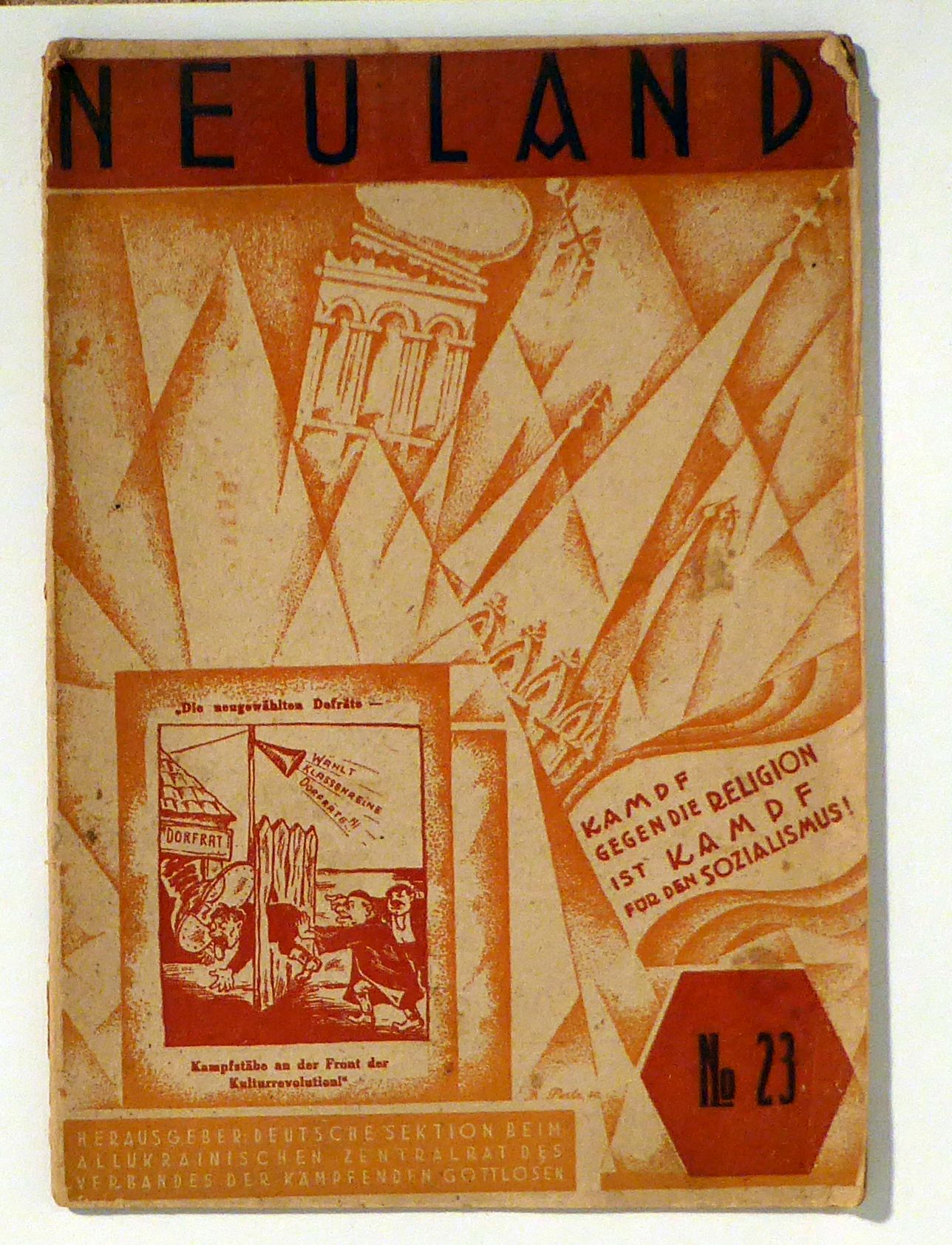 Cover of the magazine «Das Neuland» 1930, No. 23. Neuland. Antireligiöse Zweiwochenschrift der Sowjetdeutschen. Hrsg.: Deutsche Sektion beim Allukrainischen Zentralrat des Verbandes der kämpfenden Gottlosen. Charkow: Zentralverlag, 1930. 40 S., mit Abbildungen nach Fotografien, Zeichnungen und Holzschnitt-Vignetten. Einband: Original broschiert. Format: gr.8°. Reihe: Neuland, 23 (1930). Einzelheft einer seit 1928 erscheinenden Agitations- und Propagandazeitschrift der deutschsprachigen Bevölkerung in der Ukraine. Die Hefte befassen sich in ständigen Rubriken mit religiösen Themen, resp. Atheismus. Mit einer Umschlagsillustration Zustand: Umschlag angestaubt, eselsohrig, Papier gebräunt